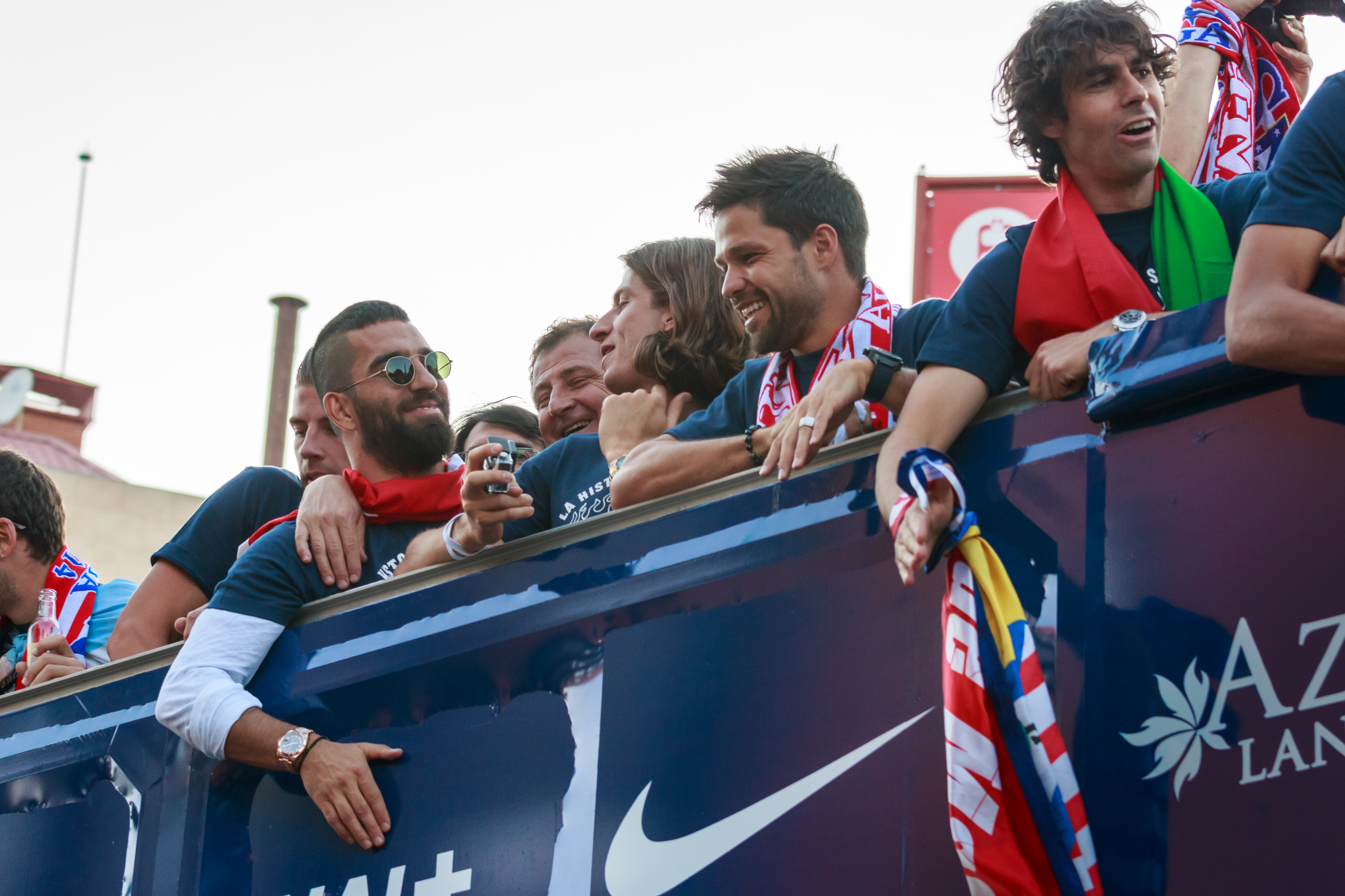 Festejos del Atlético de Madrid tras ganar la Liga BBVA 2013/2014.